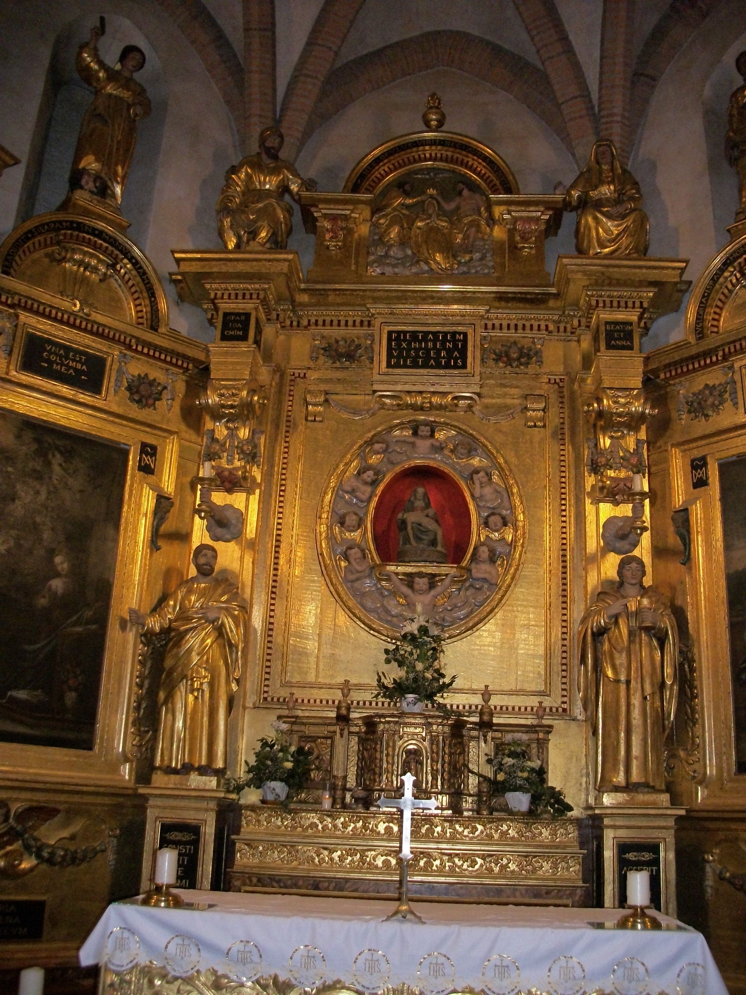 Le retable du chœur.